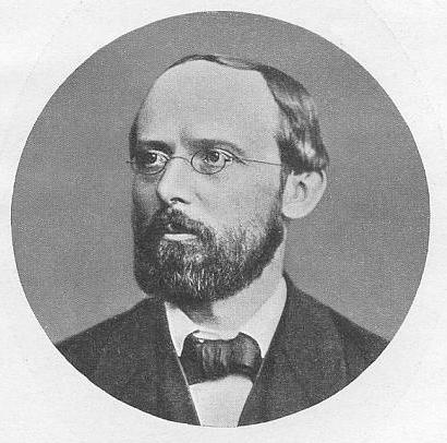 Wilhelm Christ (1831–1906), deutscher klassischer Philologe. Originalphotographie.